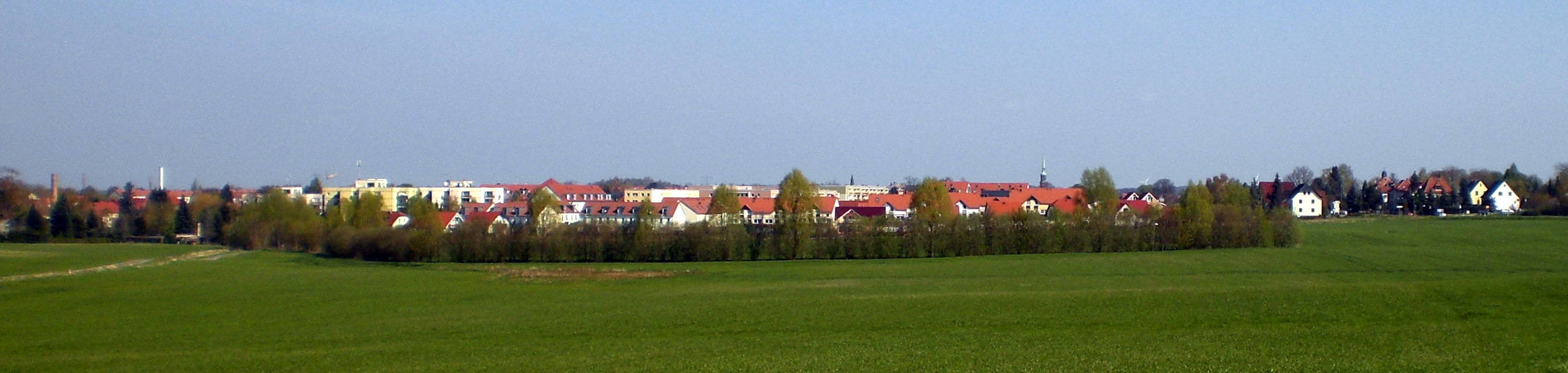 Radeberg (Sachsen), Ansicht aus Süden